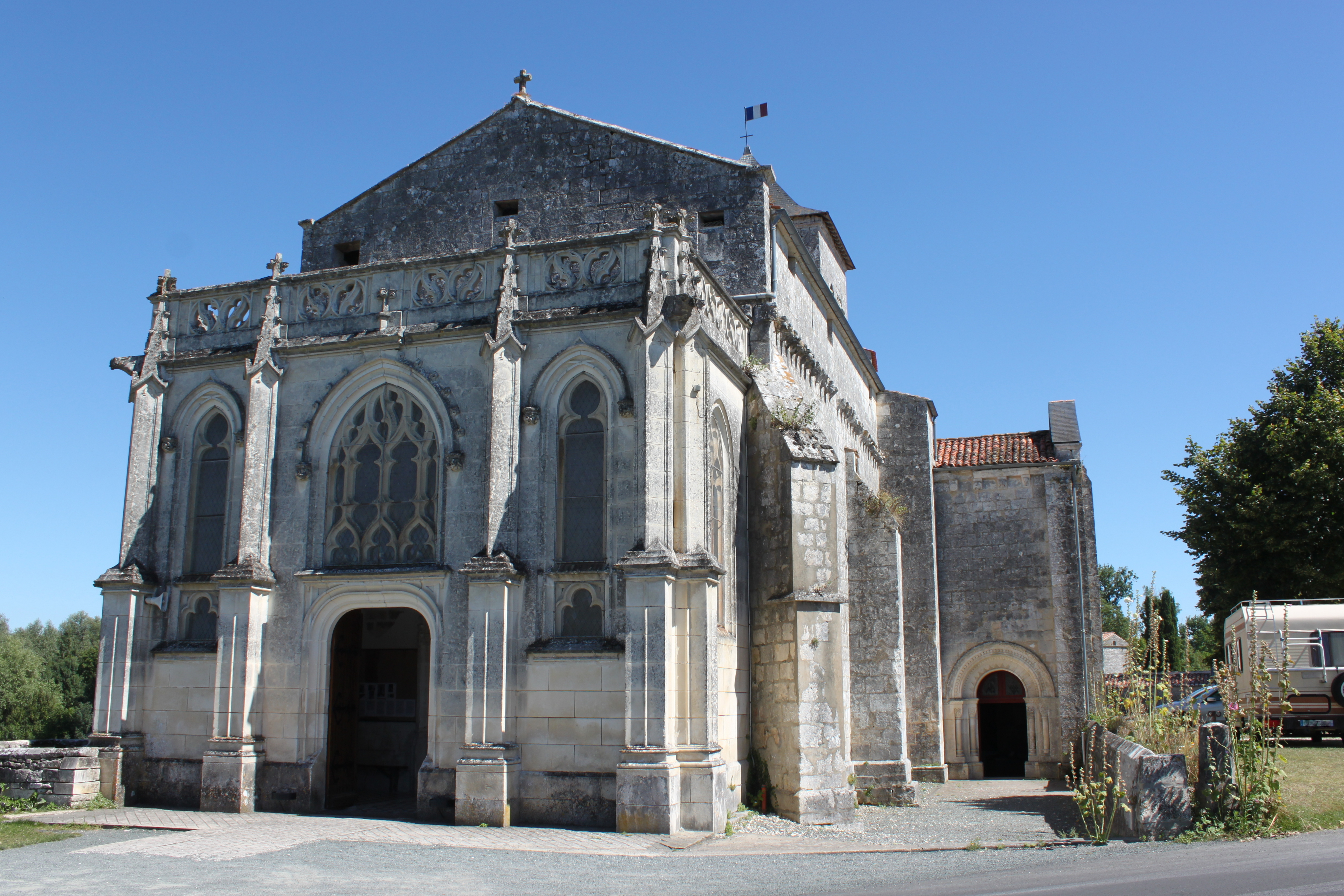 Église Saint-Saturnin-de-Séchaud, Saint-Saturnin, Fr-17-Port-d'Envaux.